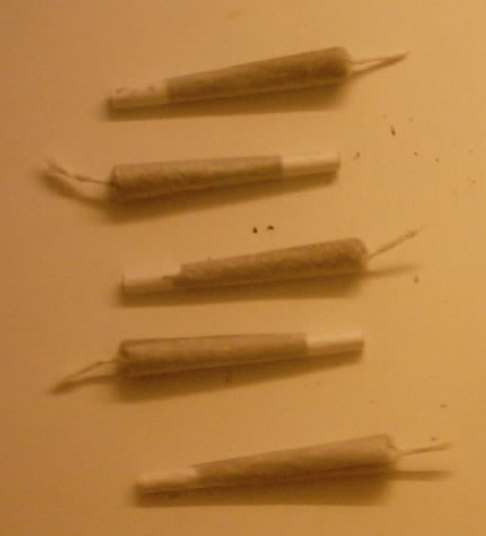 5 Joints mit insg. ca. 2g Marihuana